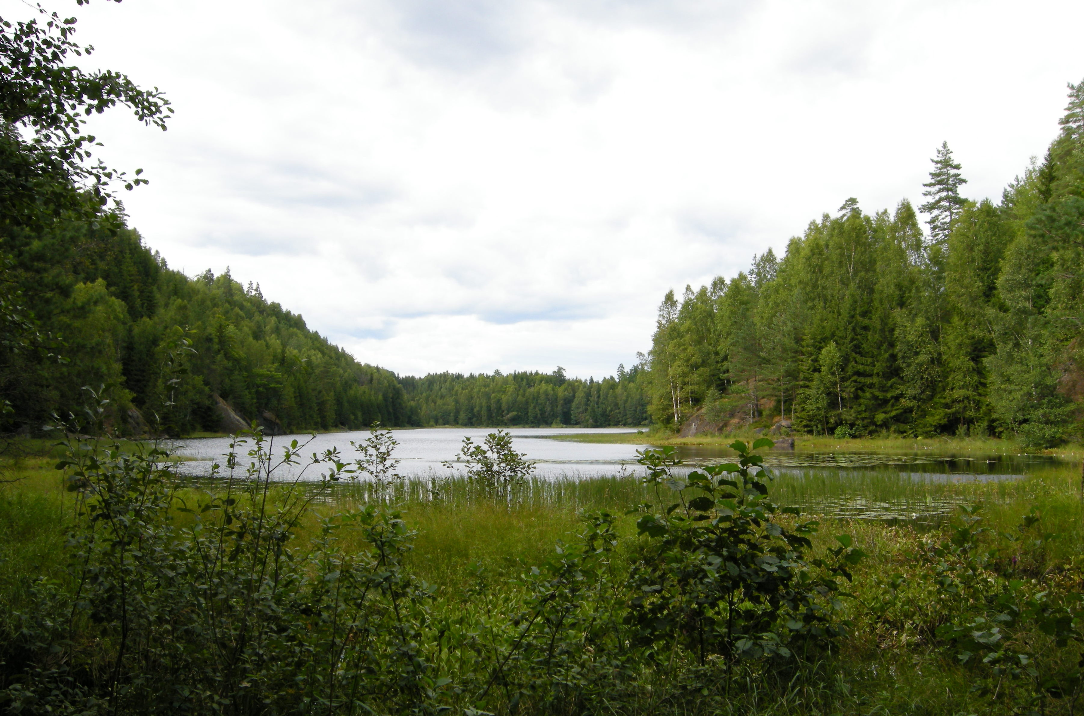 Lauvbuvannet / Laubuvannet, Vestmarka, Larvik